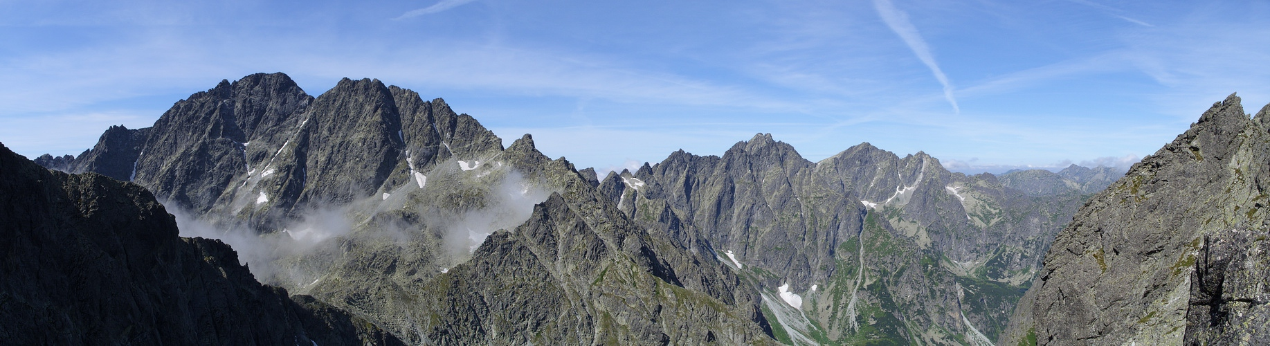 Widok z Turni nad Rohatką (2332 m n.p.m.).